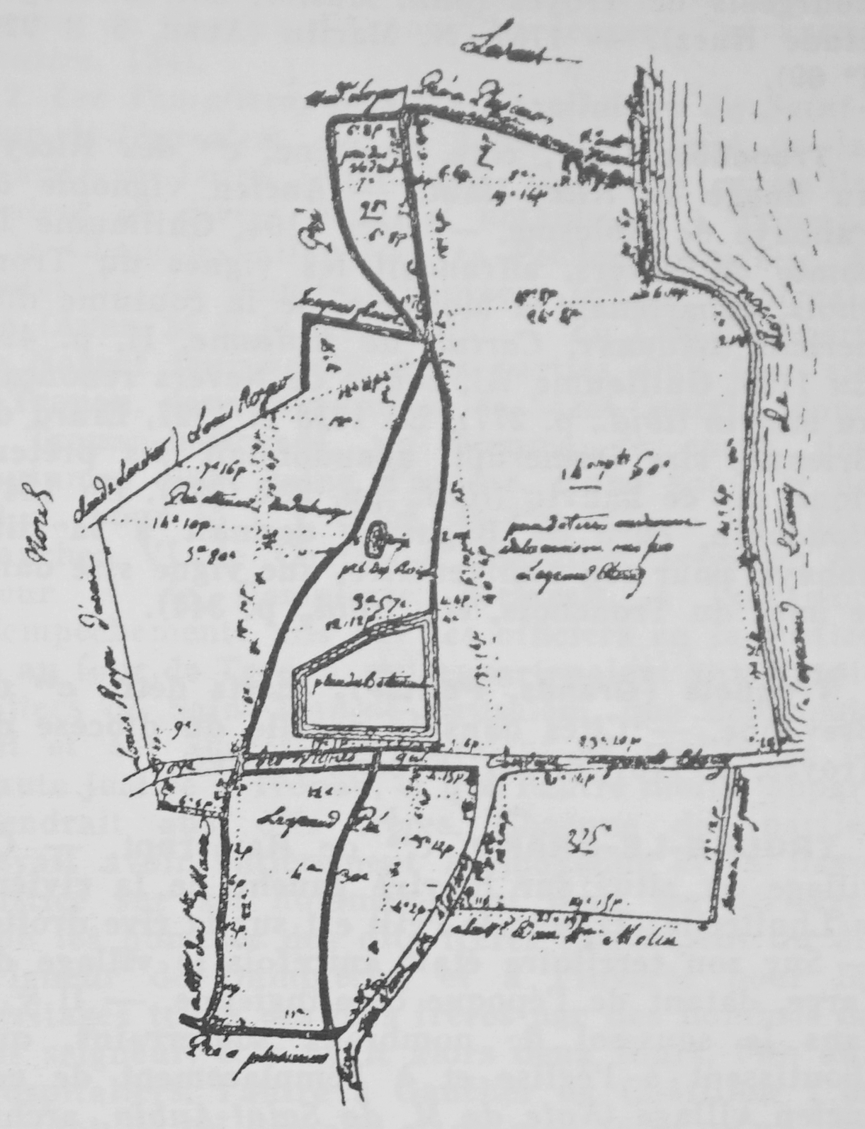 une vue de Tronchay.